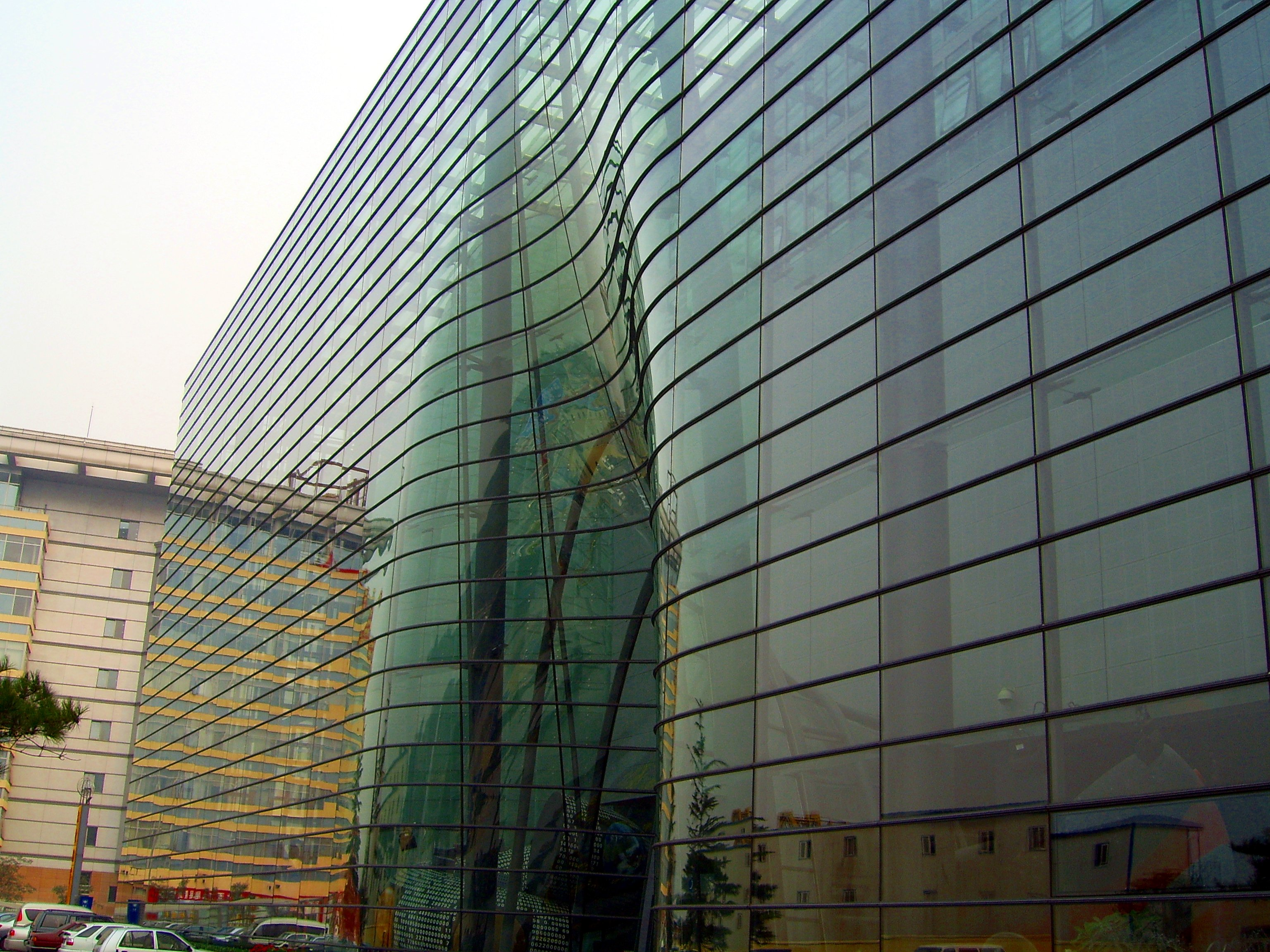 北京天文馆新馆